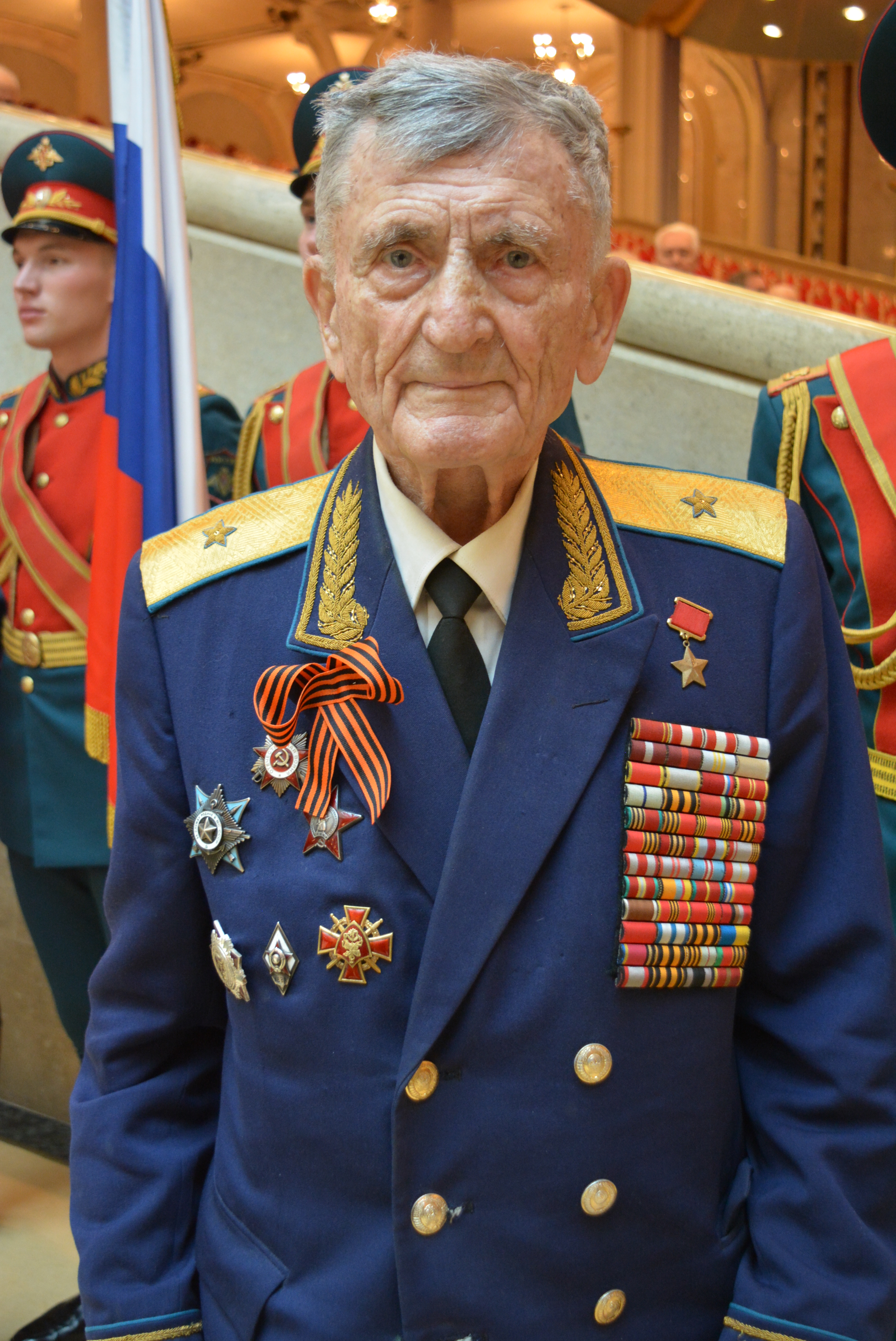 Герой Советского Союза Сергей Макарович Крамаренко. 2016 год.